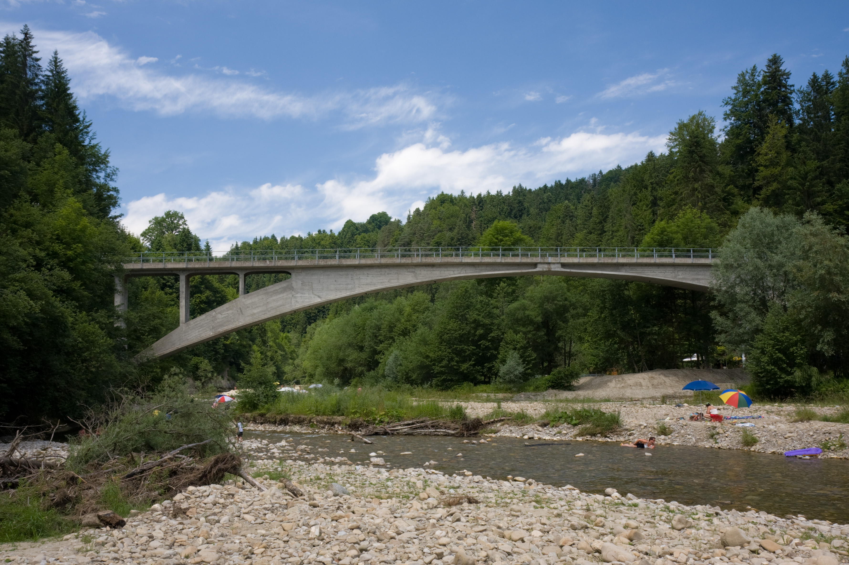 Die Rossgrabenbrücke von Robert Maillart in Hinterfultigen, Gemeinde Rüeggisberg, Schweizerbaut 1932